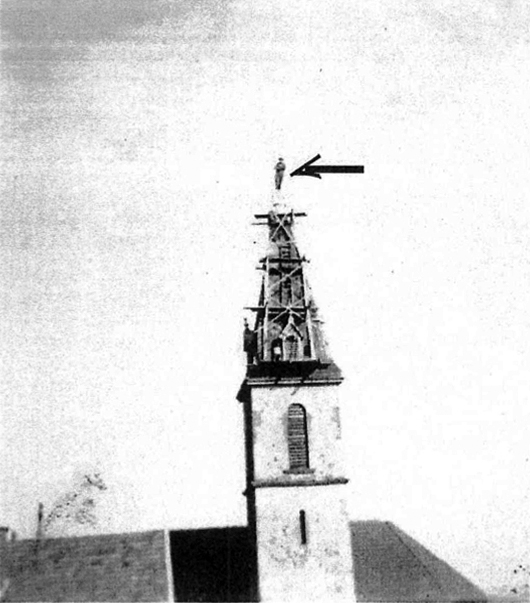 Reconstruction de la flèche du clocher de l'Église de Brion. M. Joseph Reboud sur la cime du clocher durant les travaux. Brion, Isère, AuRA, France.